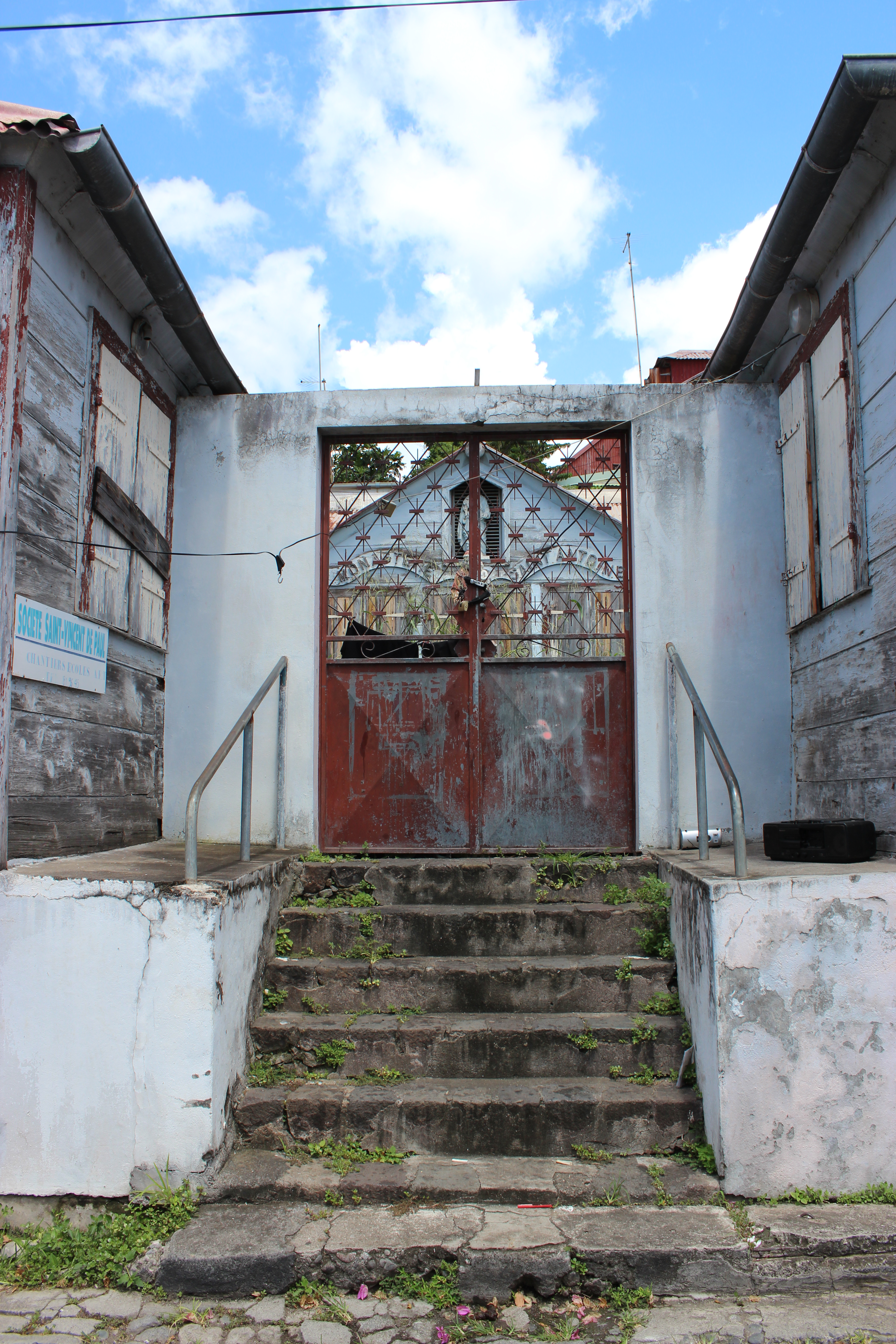 Monastère Saint-Antoine (Inscrit) .